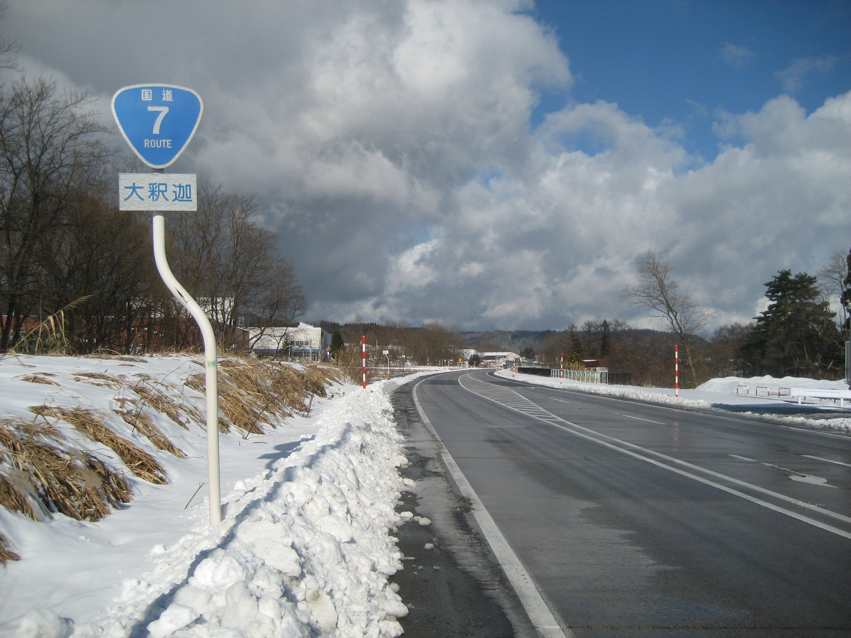 国道7号線浪岡バイパス青森県青森市浪岡大釈迦付近（青森市街方向を撮影）